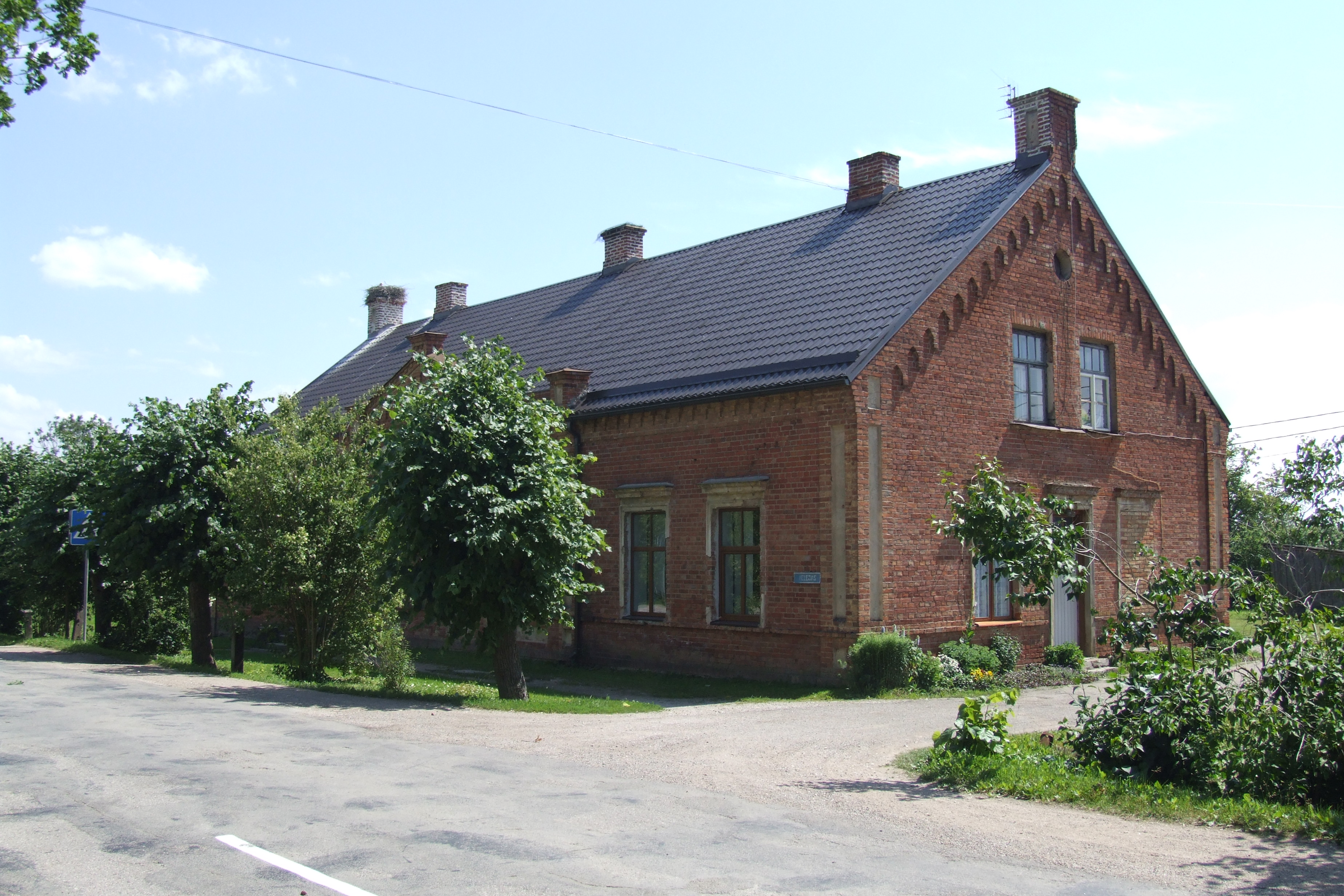 Ielejas, 02.07.2011.